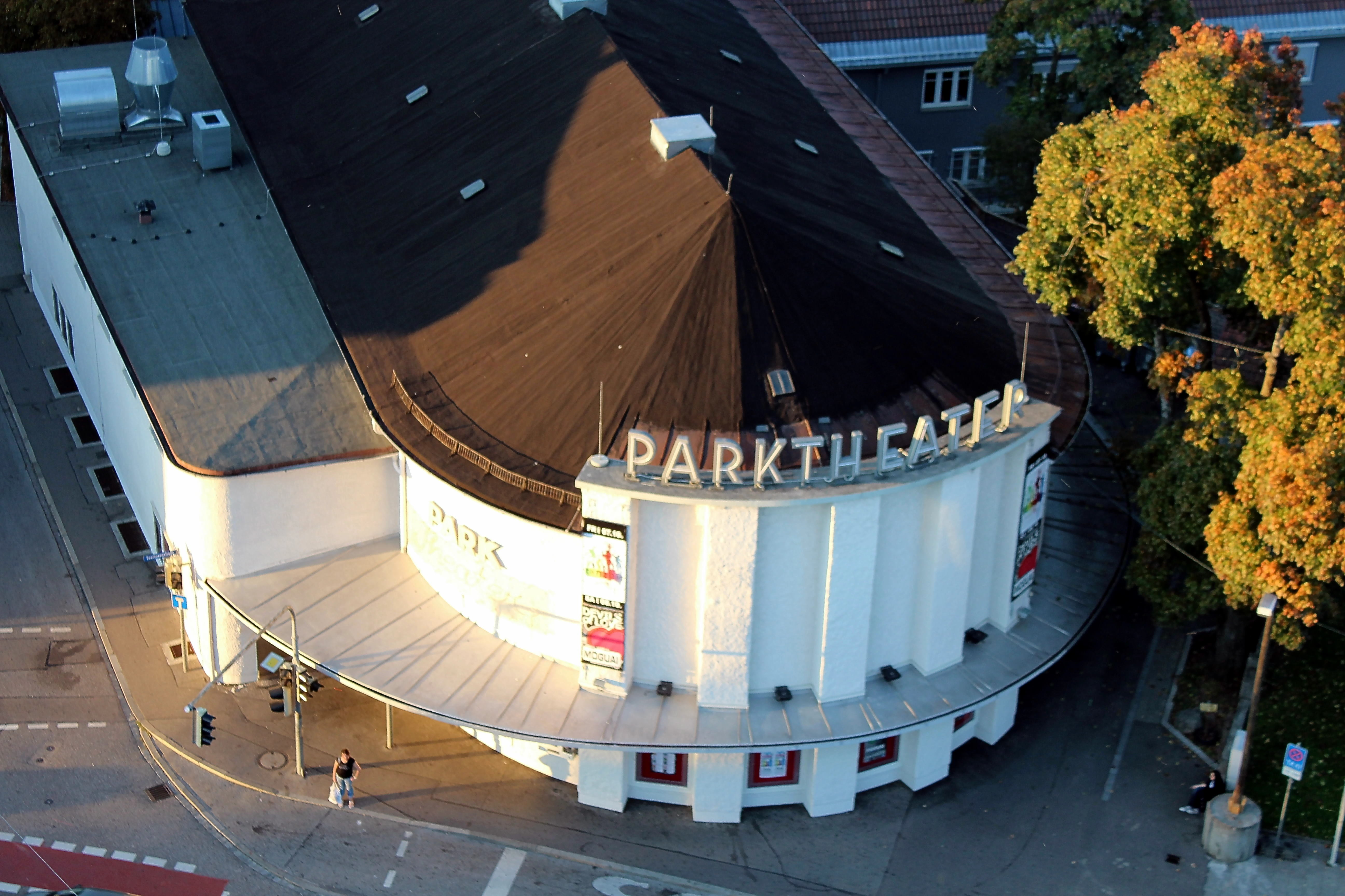 Parktheater in Kempten, Herbst 2011. Aufgenommen vom Parkhotel Kempten.